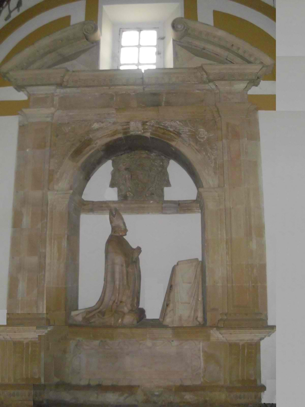 Tumba del Obispo Don Juan de Cuenca. Puebla de Almenara. Cuenca